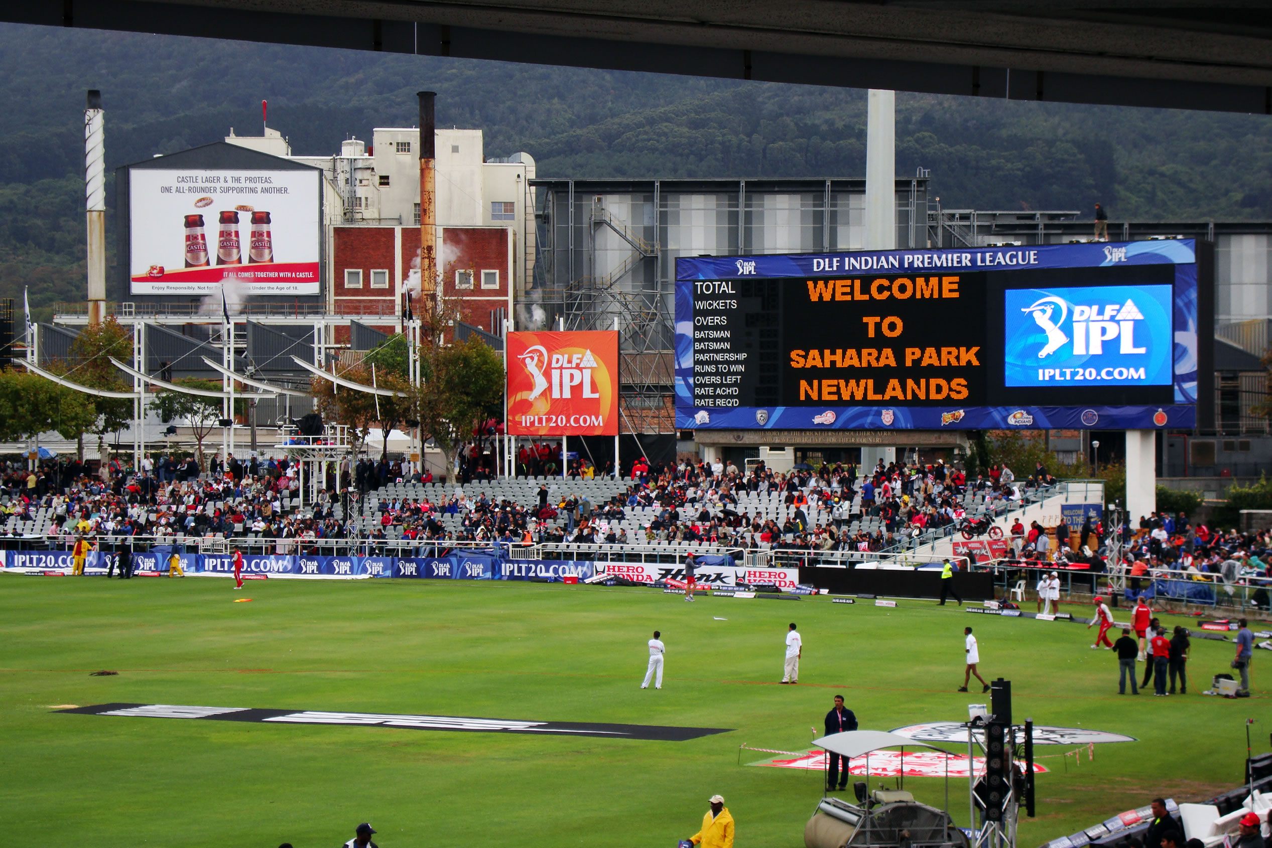 Delhi Daredevils v/s Kings XI Punjab, 19 April 2008, 2009 IPL